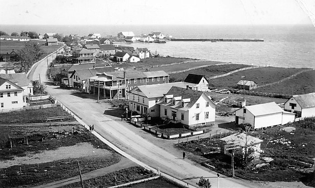 Photographie du village de Grande-Rivière. On aperçoit au loin le quai et les installations de pêche.